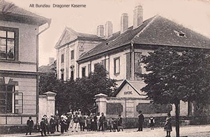 Kaserne des Dragoner Rgt 14 in Alt-Bunzlau (Stará Boleslav)